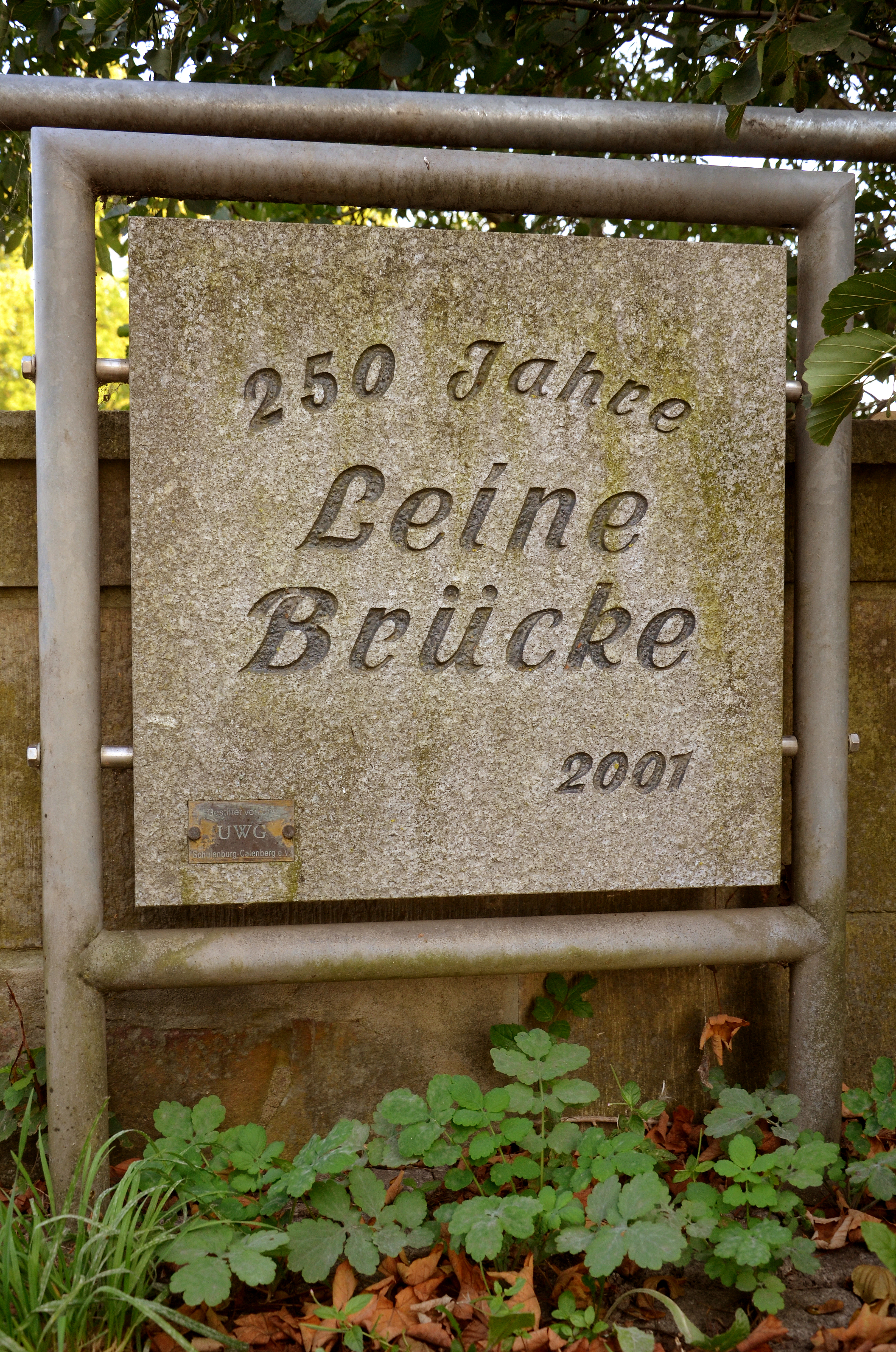 Für die 1751 errichtete Calenberger Brücke über die Leine, die im Zuge der Anlage der Landstraße von Gestor bis nach Rössing bei Schulenburg enstand, stiftete die Unabhängige Wählergemeinschaft UWG Schulenburg-Calenberg e.V. 2001 diese Denktafel mit der Aufschrift „250 Jahre Leine Brücke ...“ ...